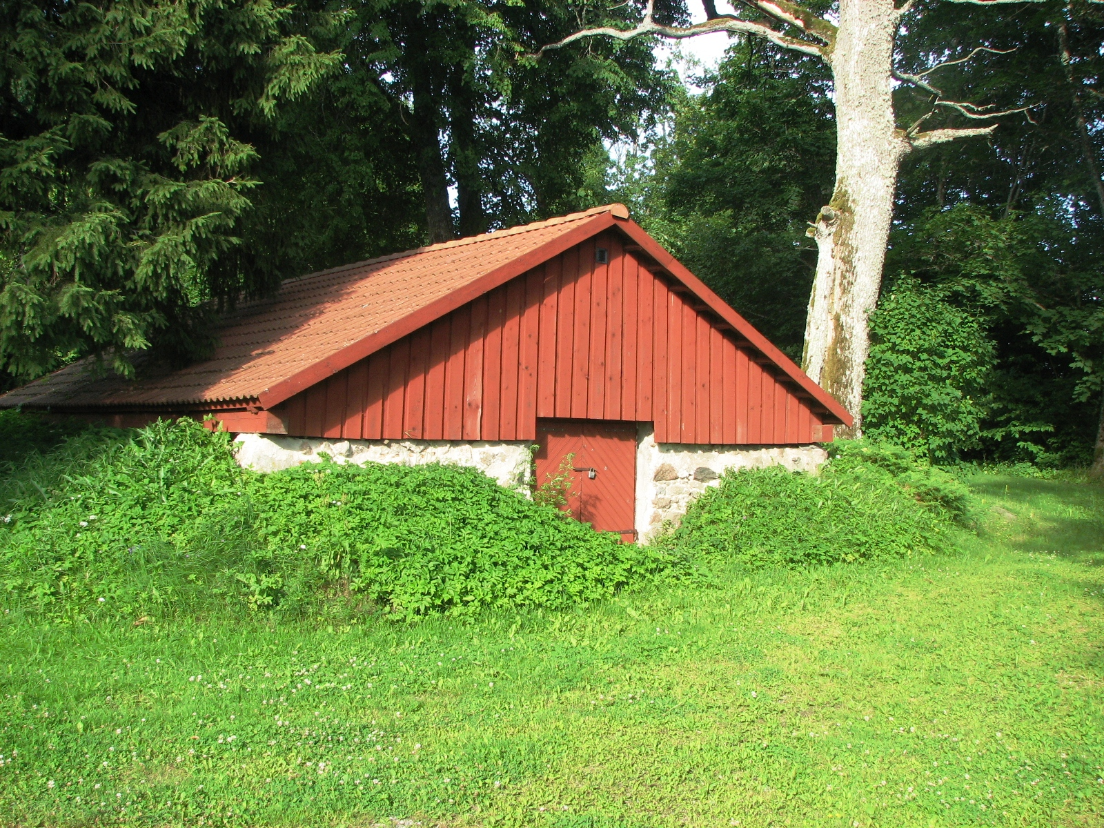 Lodja postijaama kelder